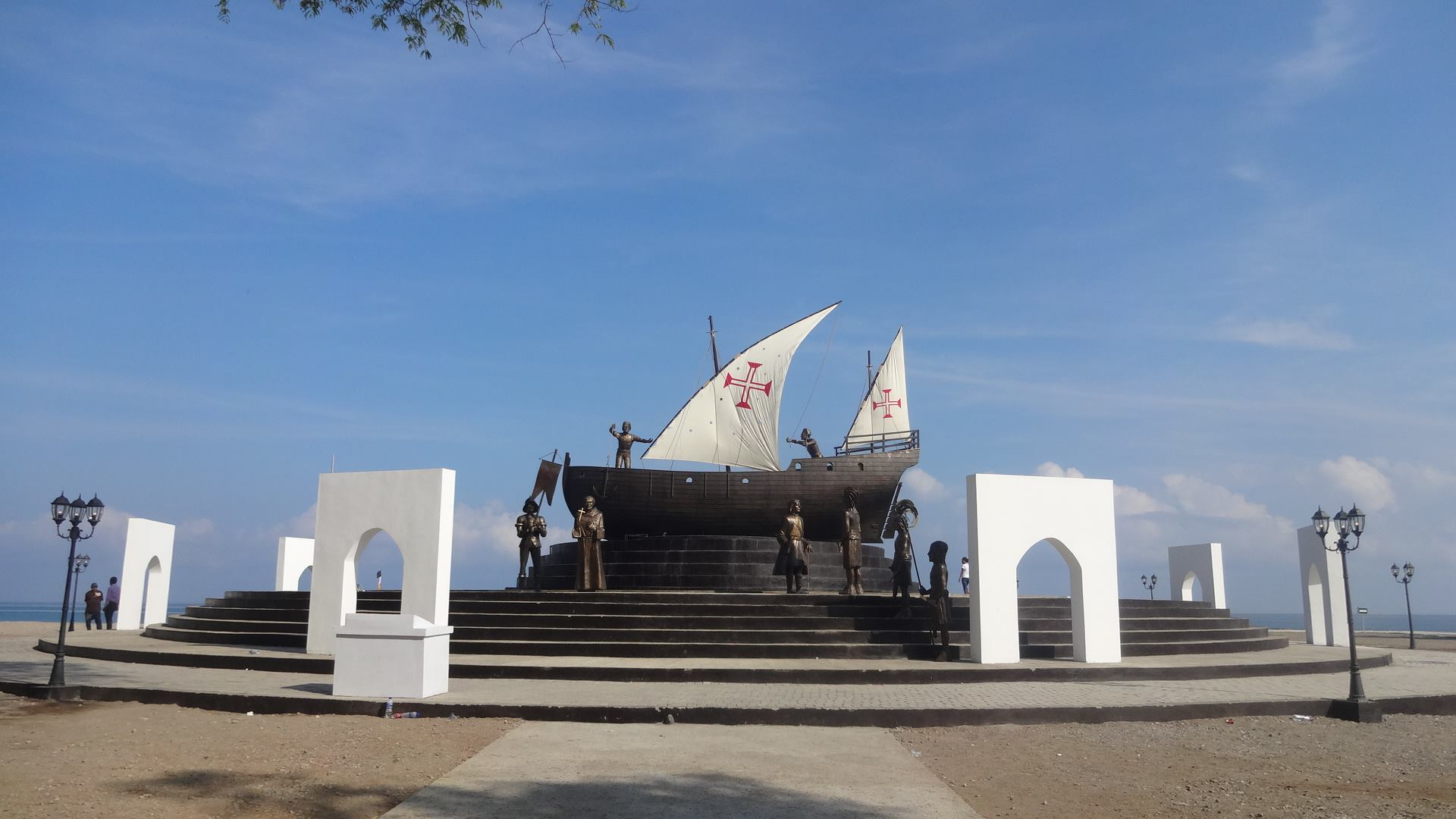 Lifaumonument